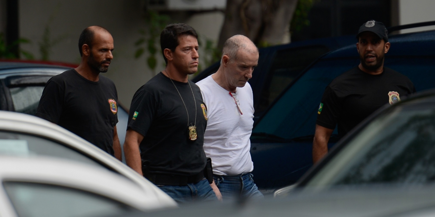 Rio de Janeiro - Empresário Eike Batista deixa a sede da PF, na região portuária do Rio, após depoimento na Delegacia de Combate ao Crime Organizado e Desvio de Recursos.